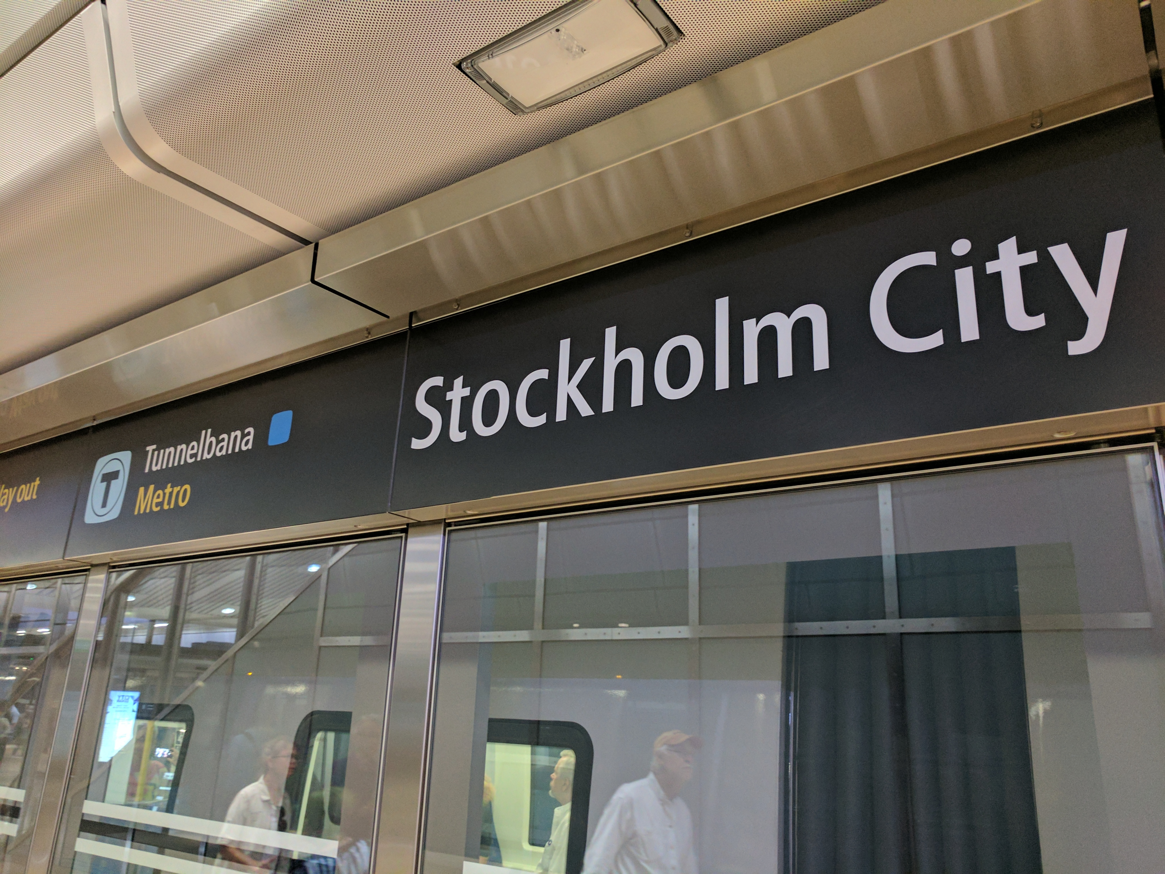 Stockholm City 20170709